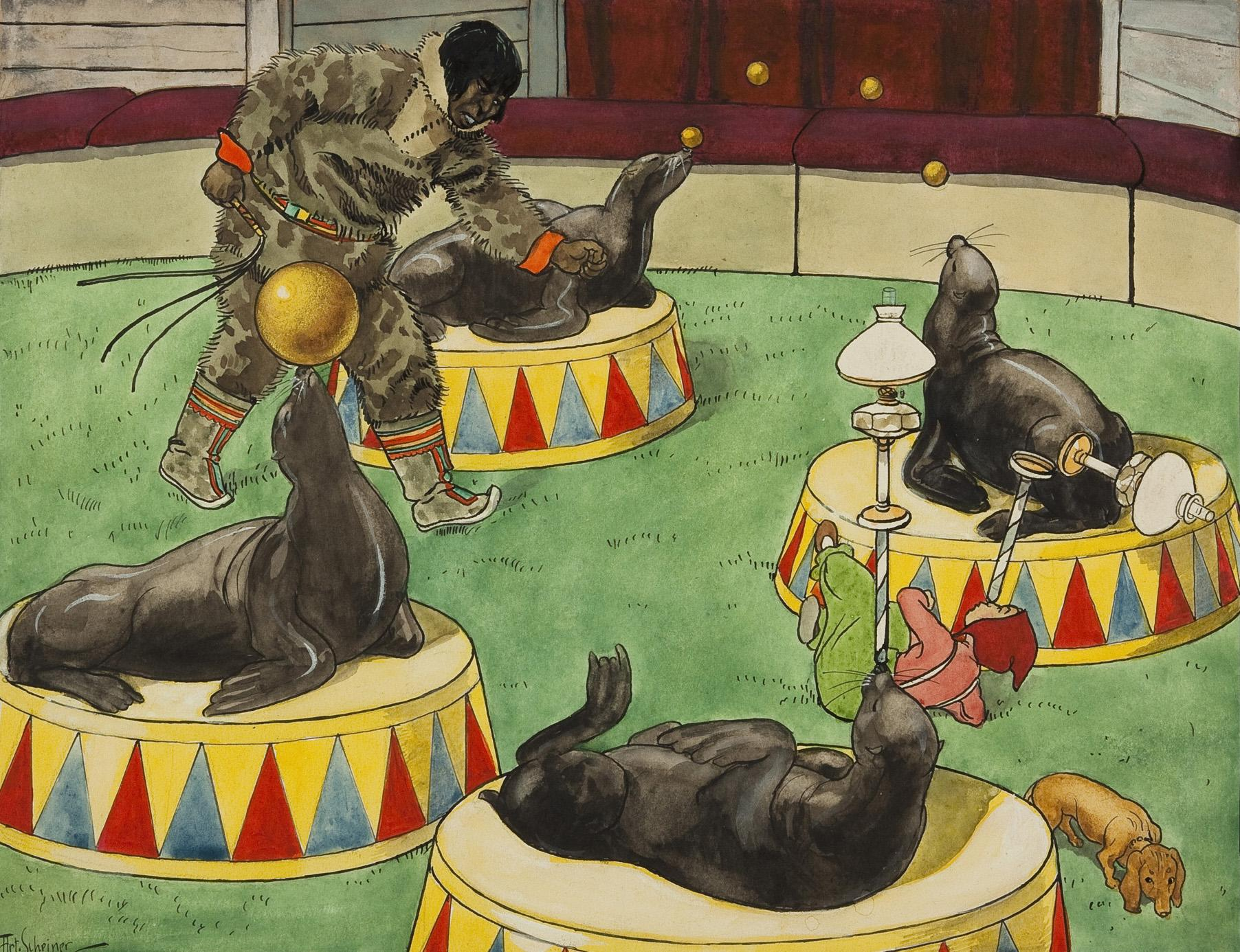 Kleiner Schlingel Kulihrášek als Jongleur